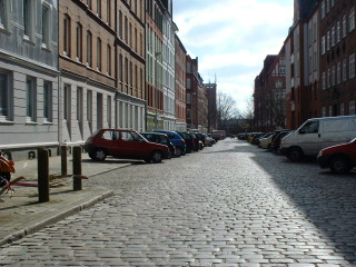 Kopfsteinpflaster